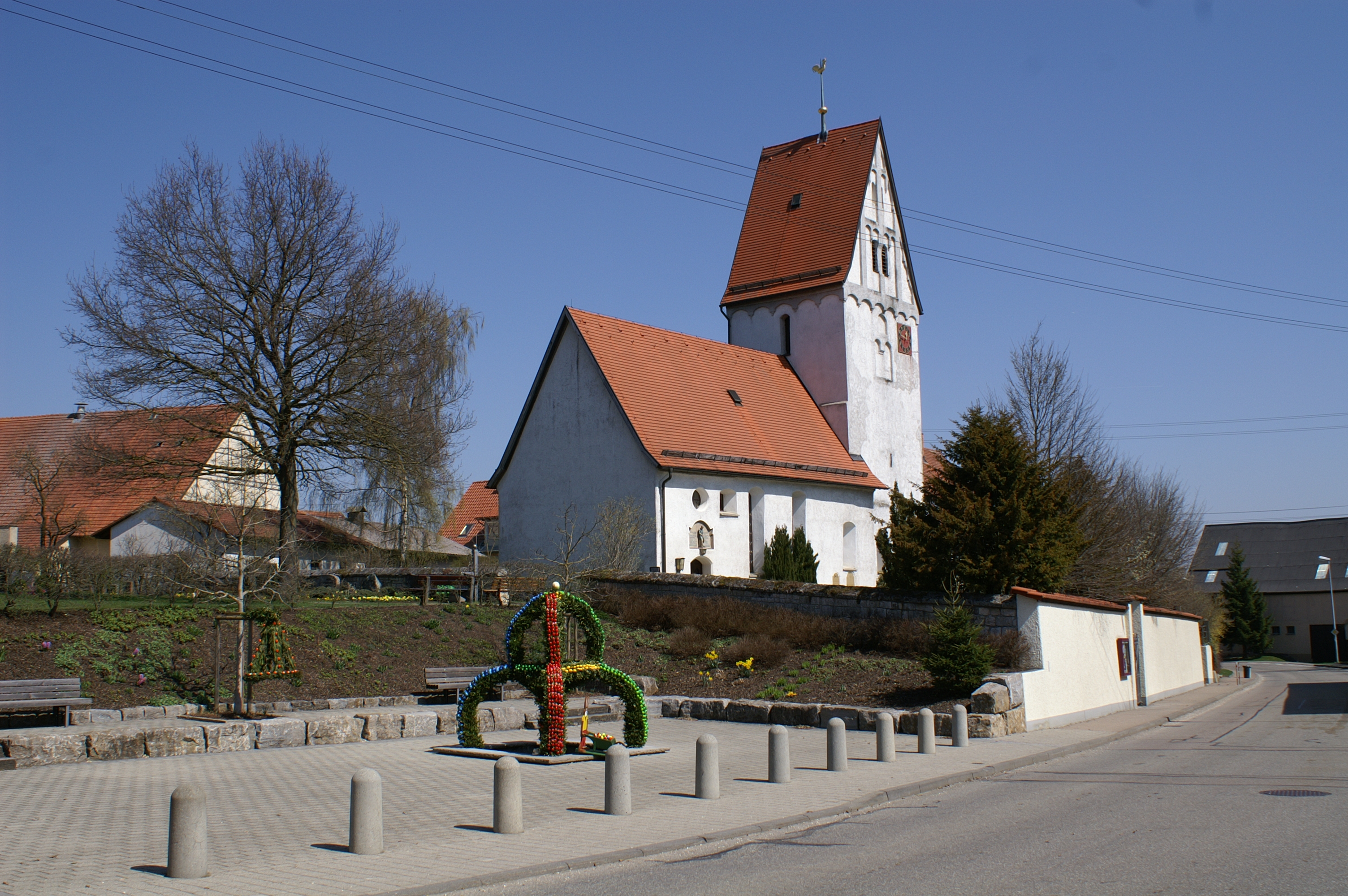 Dorfmitte des Amstetter Ortsteils Schalkstetten; Ostern 2009